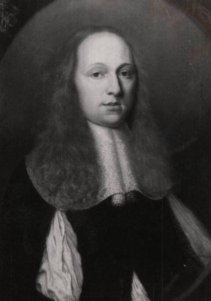 Foto von Derk Jacob Clant